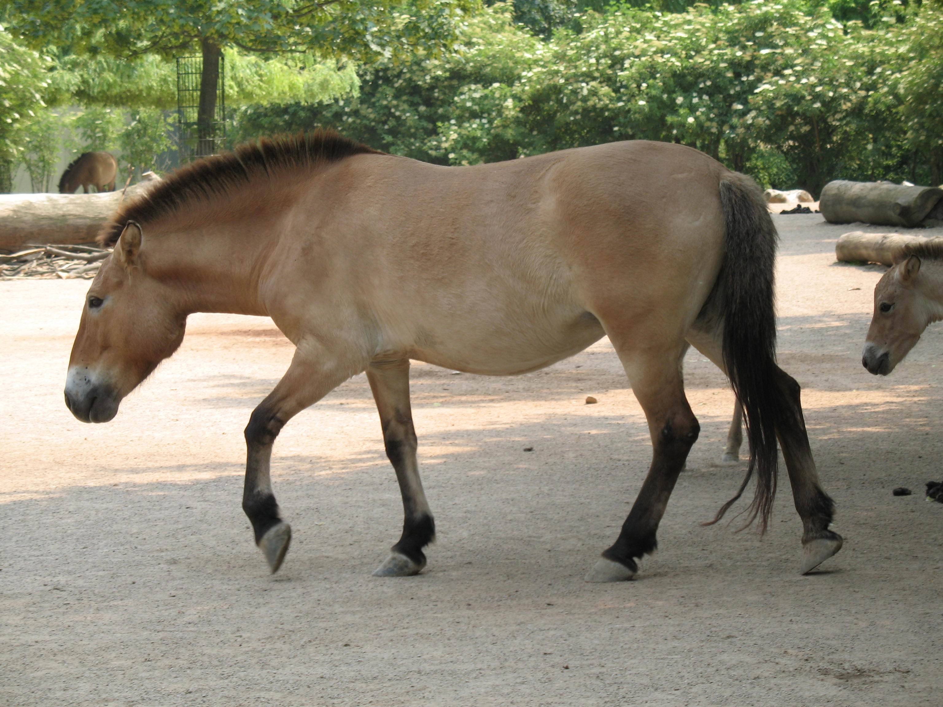 Prezewalskipferd (Kölner Zoo)